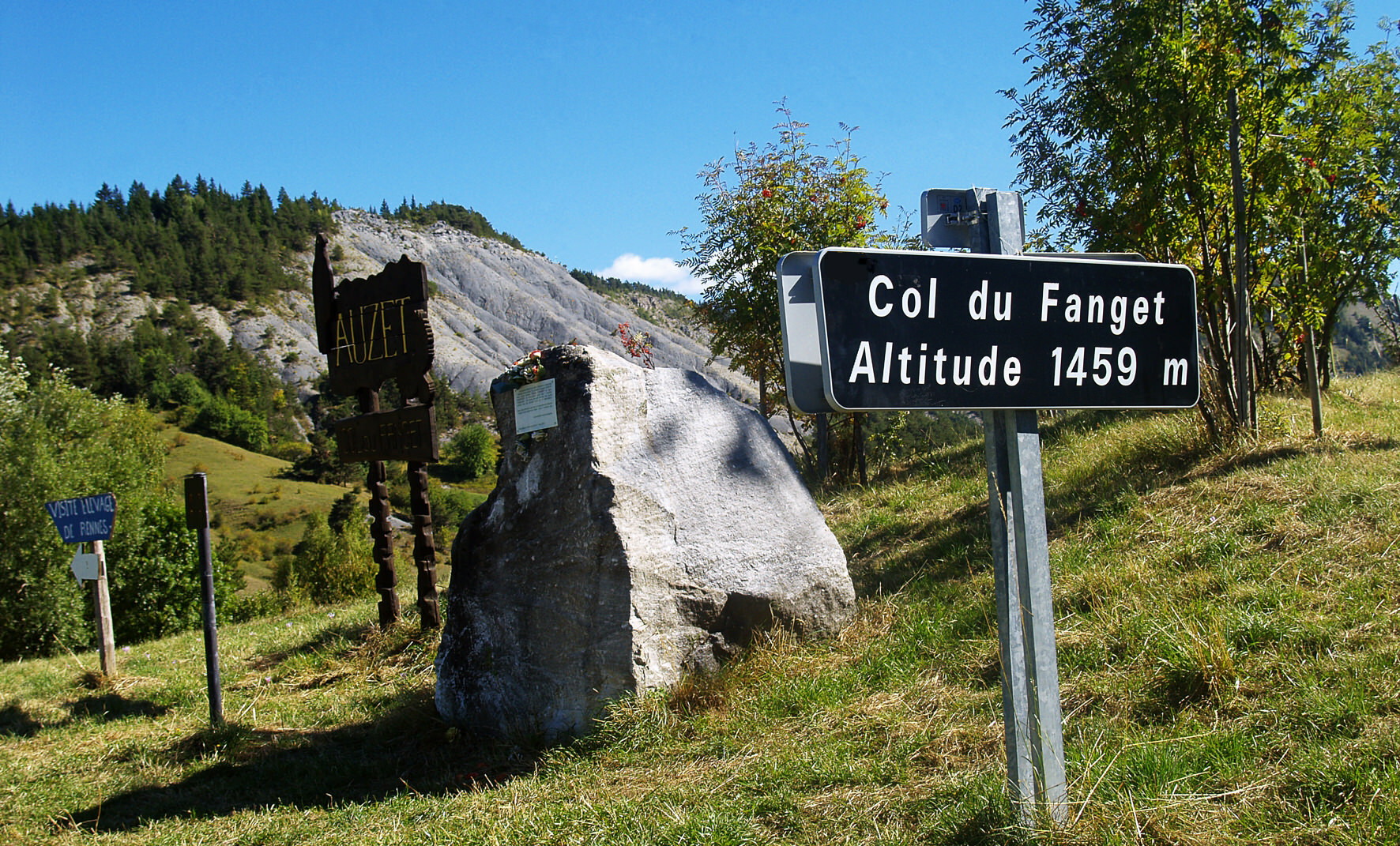 AUZET - Col du Fanget - 1459 m